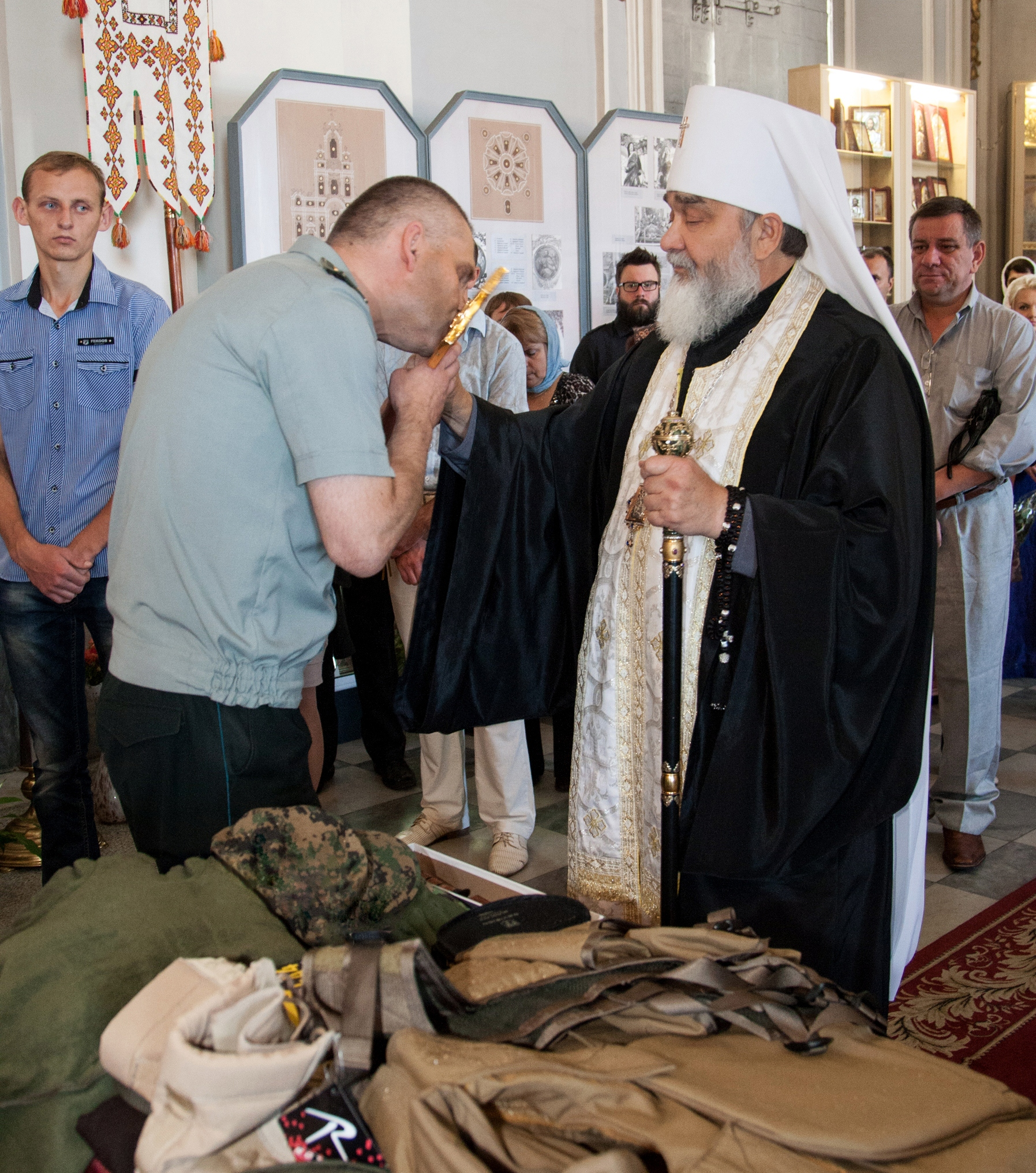 Освячення військової форми для воїнів, що беруть участь у захисті територіальної цілісності України на Донбасі. Київ, Андріївська церква, 9 вересня 2014